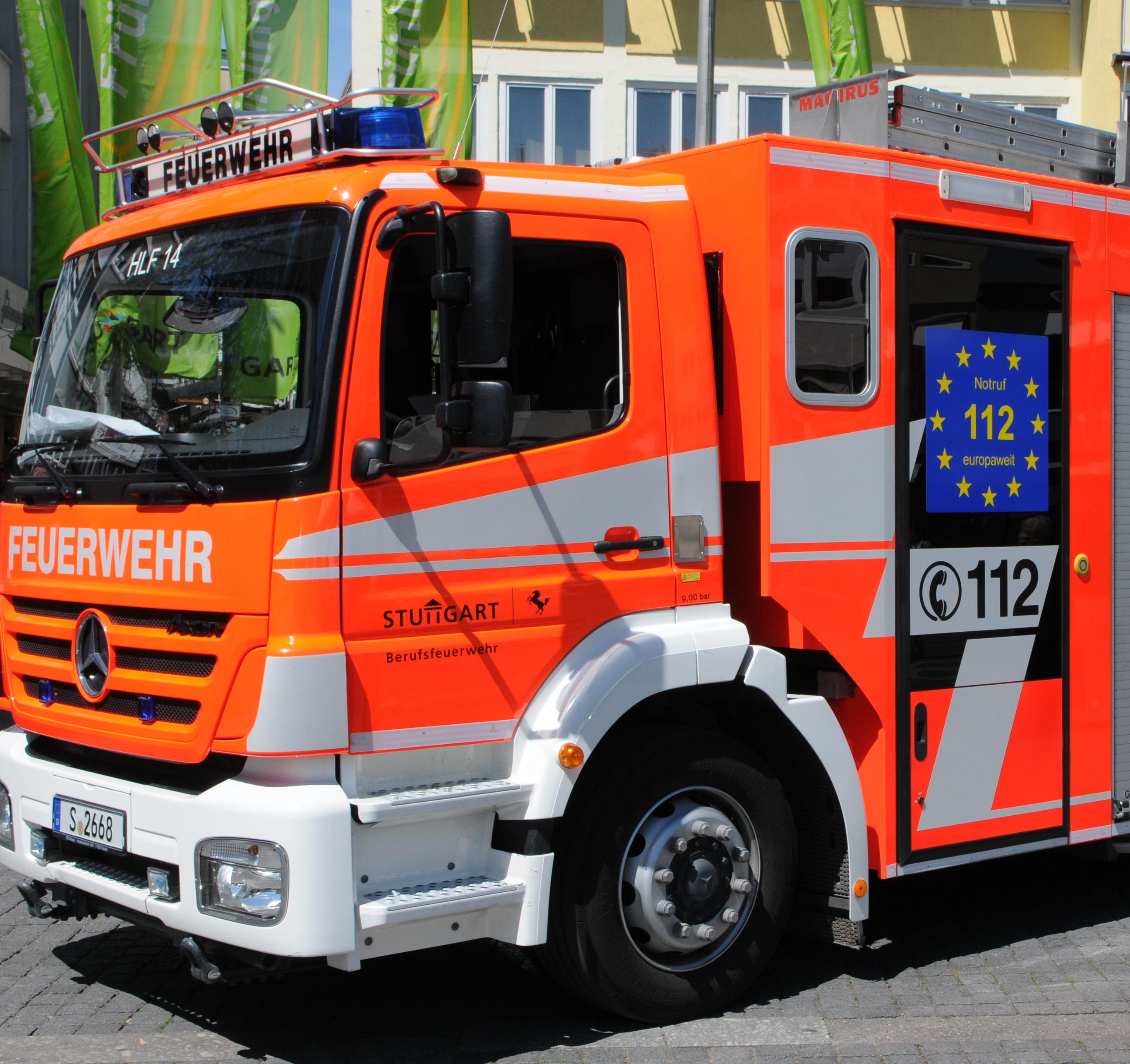 Logo des europaweiten Notrufs 112 auf Fahrzeug der Stuttgarter Feuerwehr